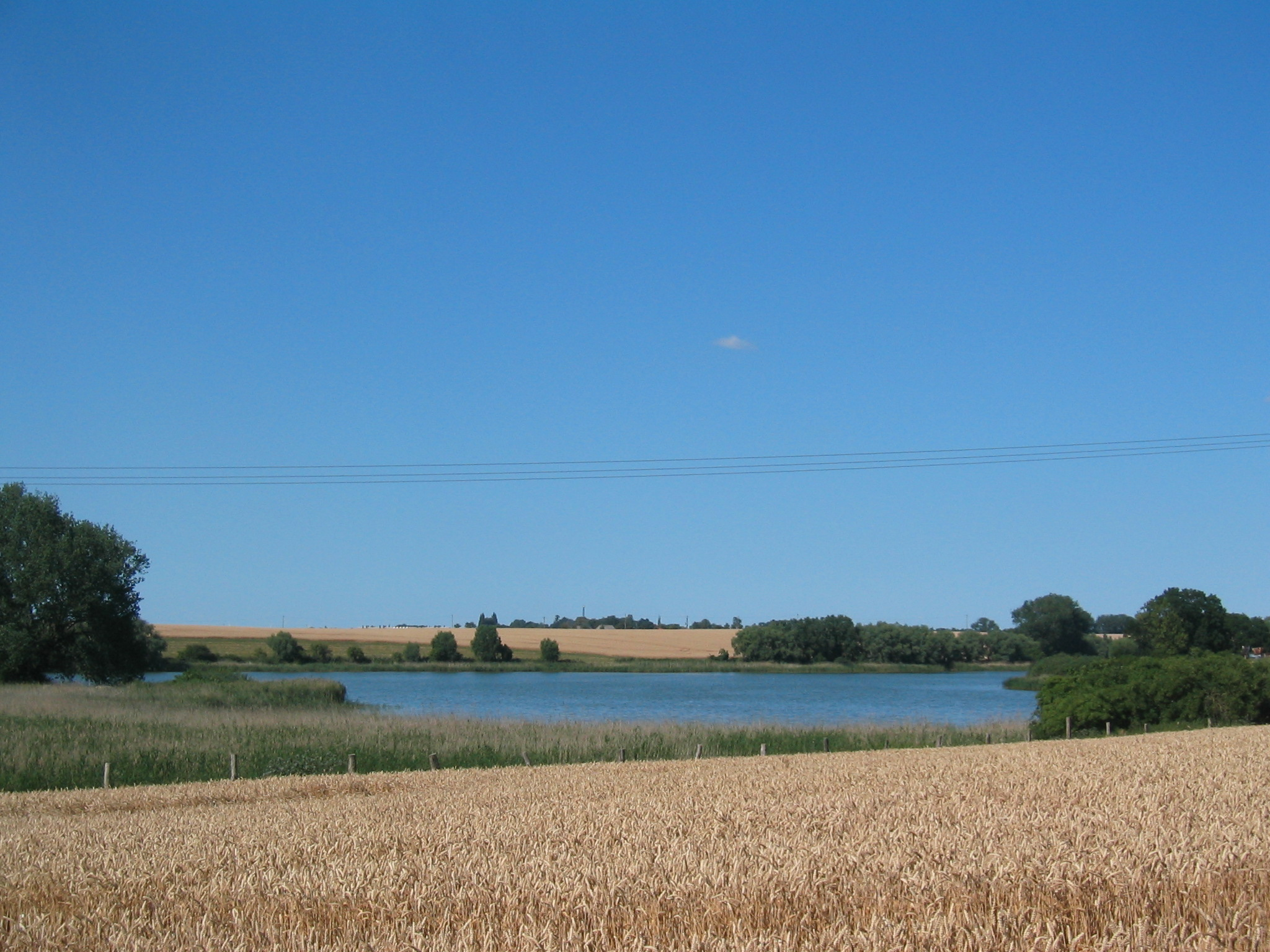 Seelübbersee bei Seelübbe von der Südseite